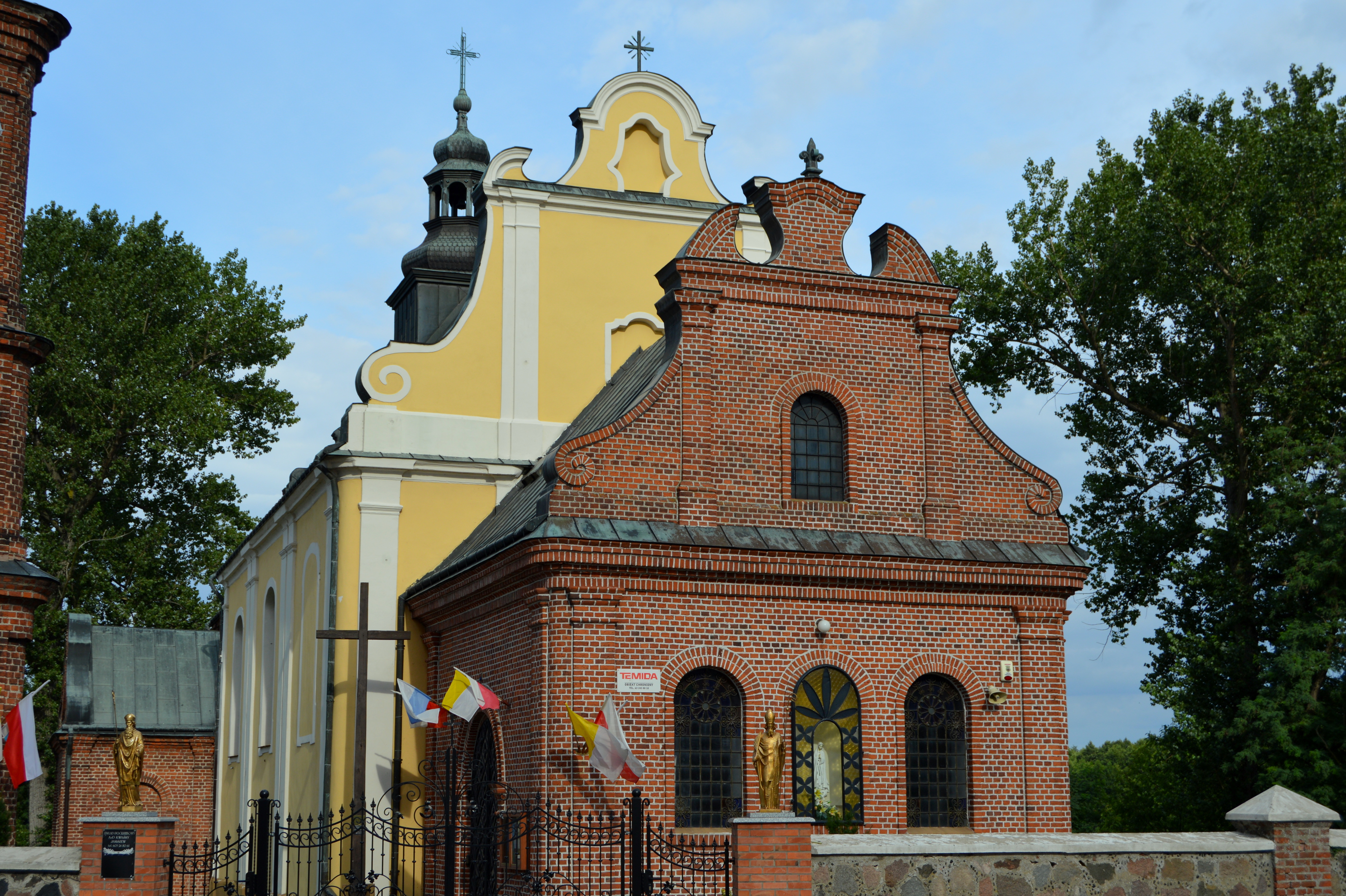 Kościół Trójcy Świętej w Dobrowie (gmina Kościelec)